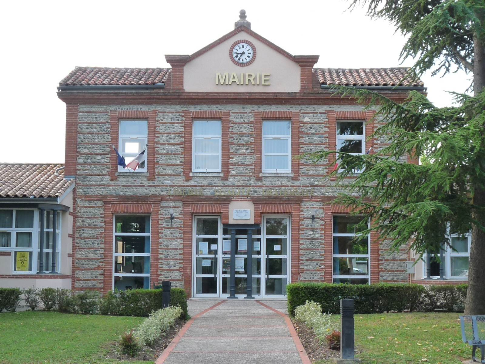 Mairie de Flourens, Haute-Garonne, France